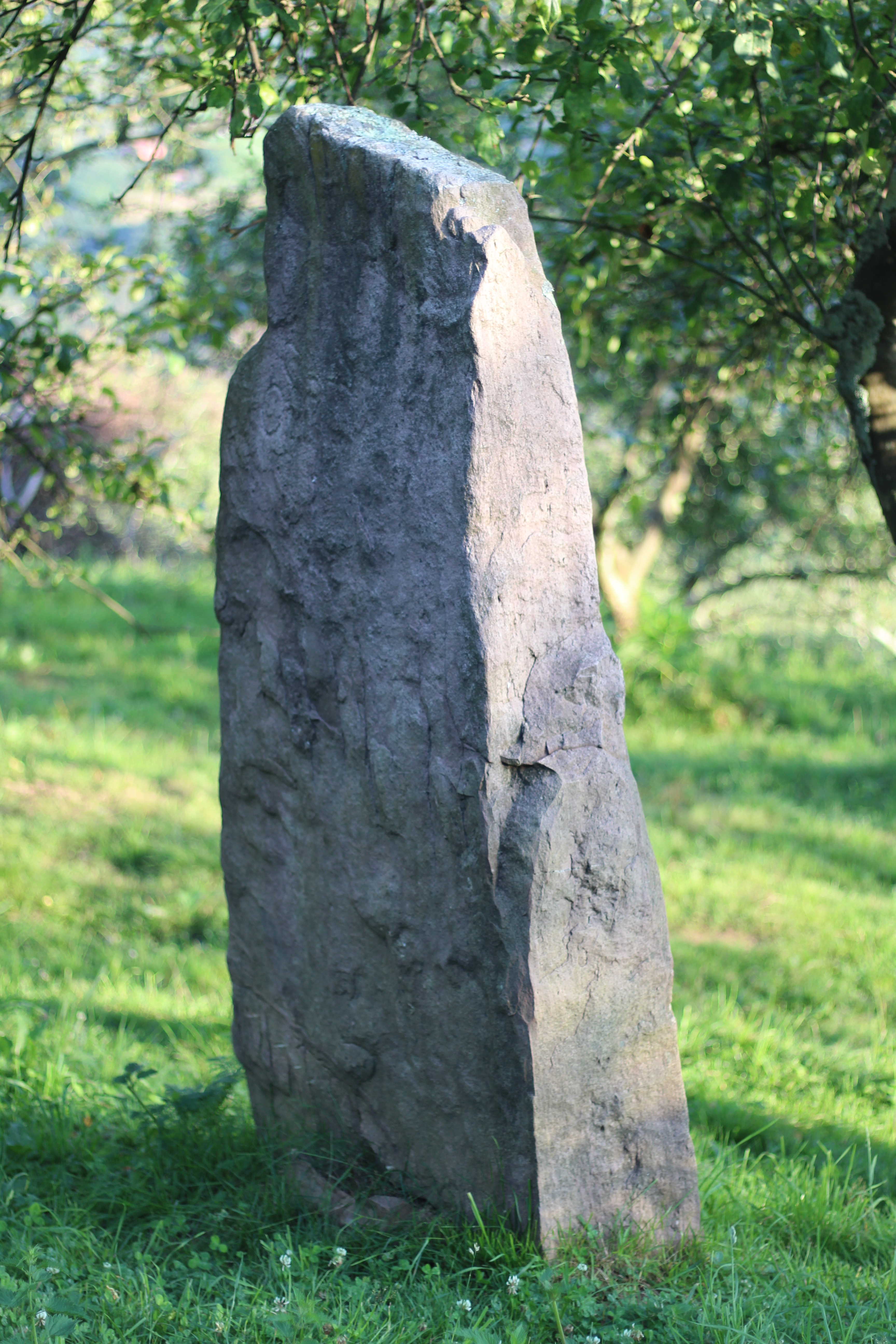 Txoritokietako zutarria